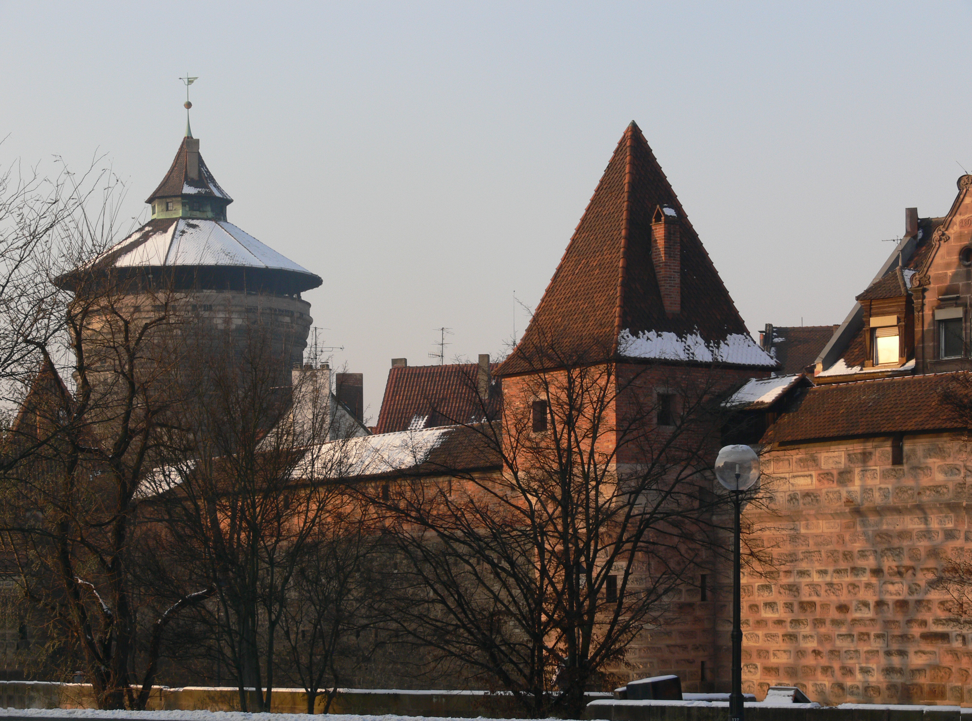 Nürnberg, Stadtbefestigung, Abschnitt "Frauentormauer" Turm "rotes N", Feldseite, im Hintergrund der Spittlertorturm ("rotes Q")